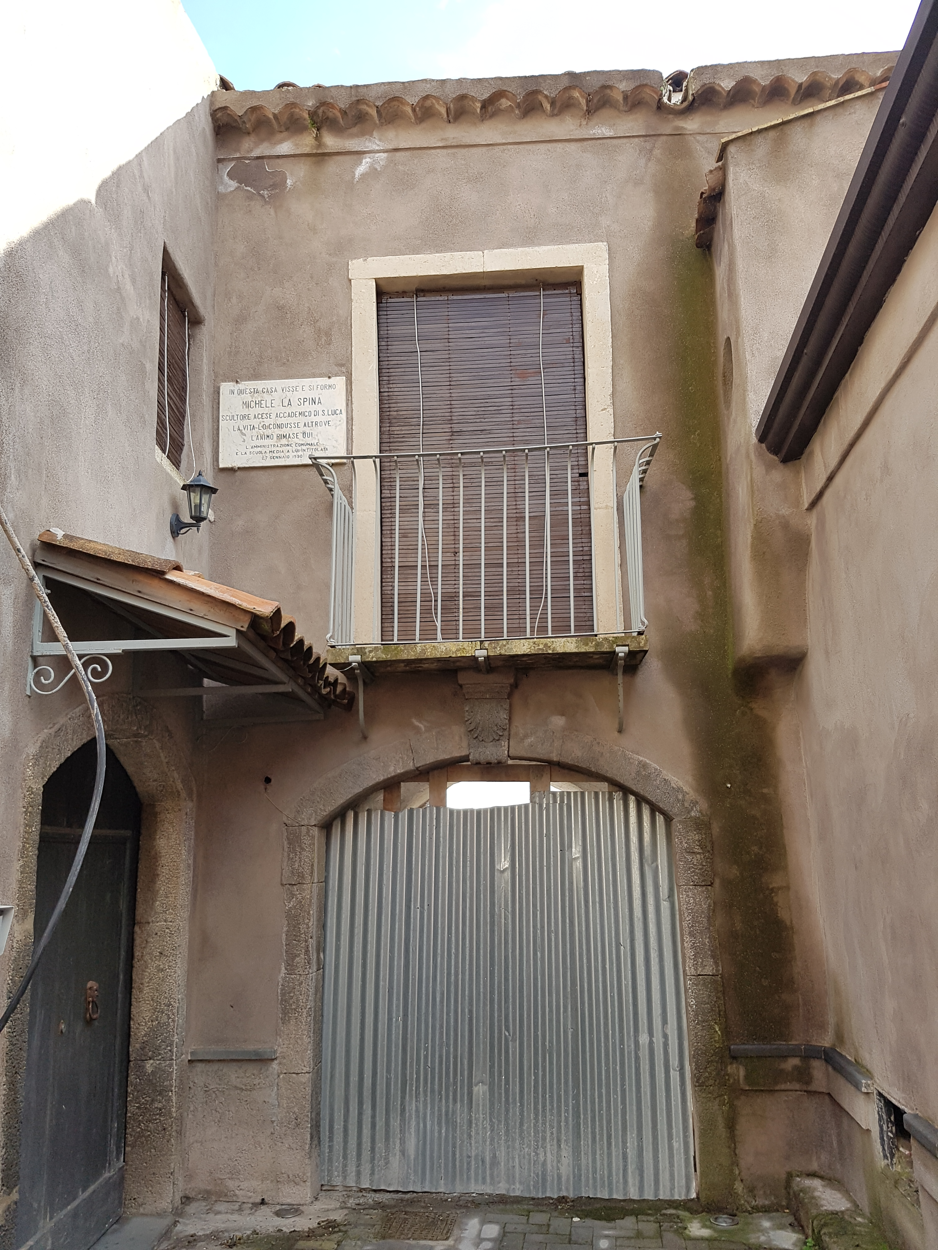 La casa di Acireale in cui visse lo scultore Michele La Spina.